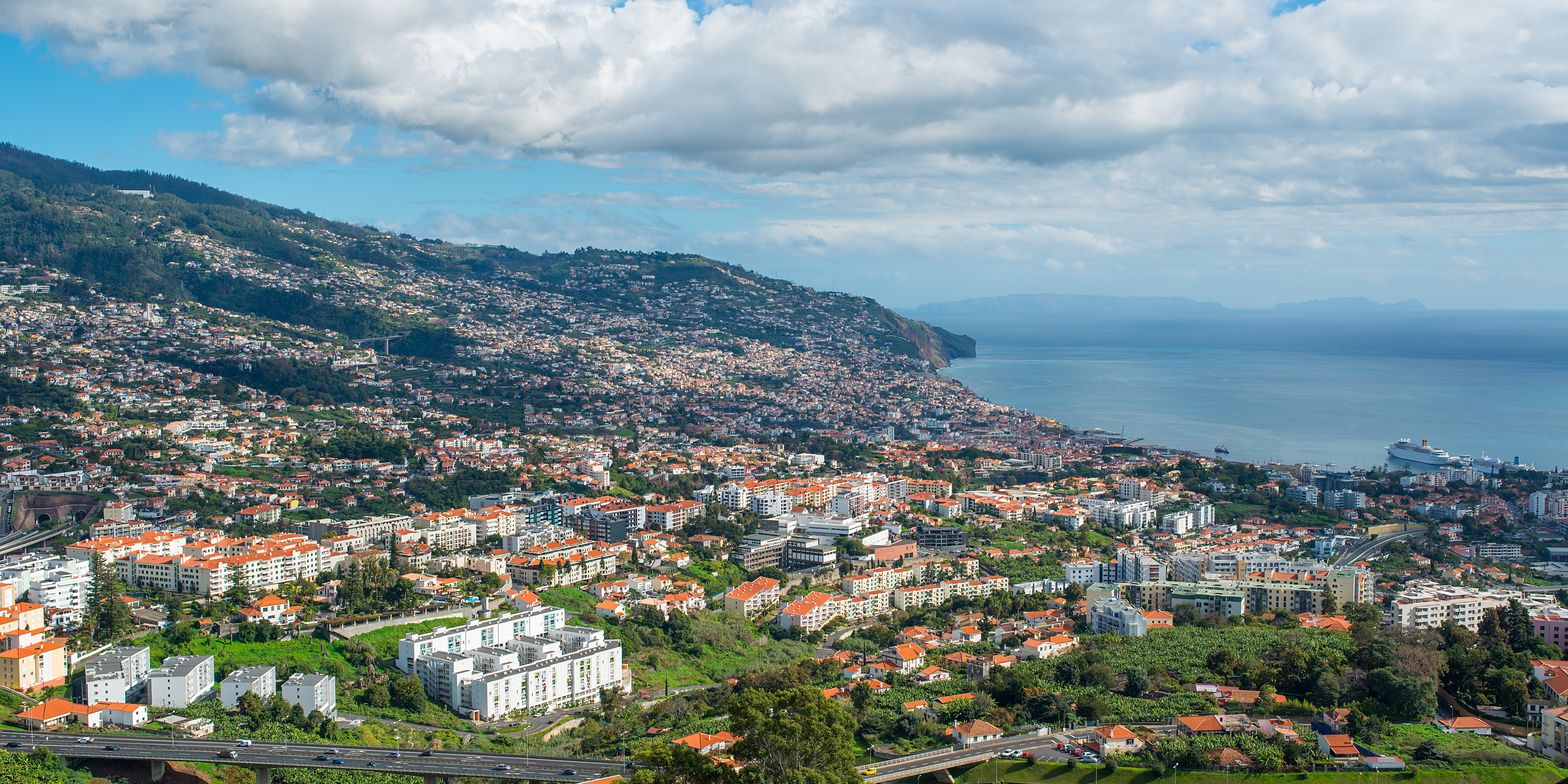 Funchal Madeira Portugal January 2014